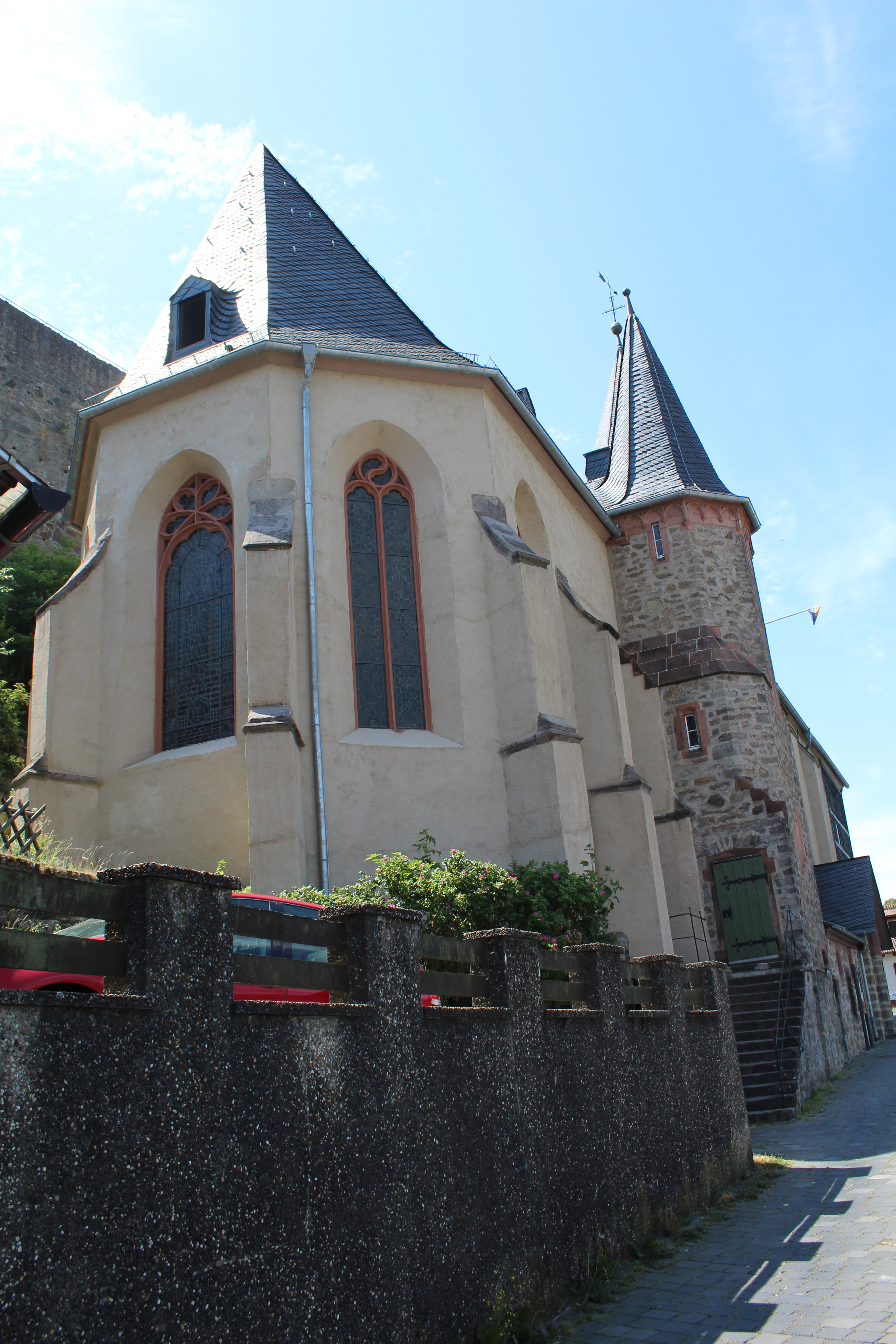 Evangelische Stadtkirche Dillenburg, Hessen, Deutschland